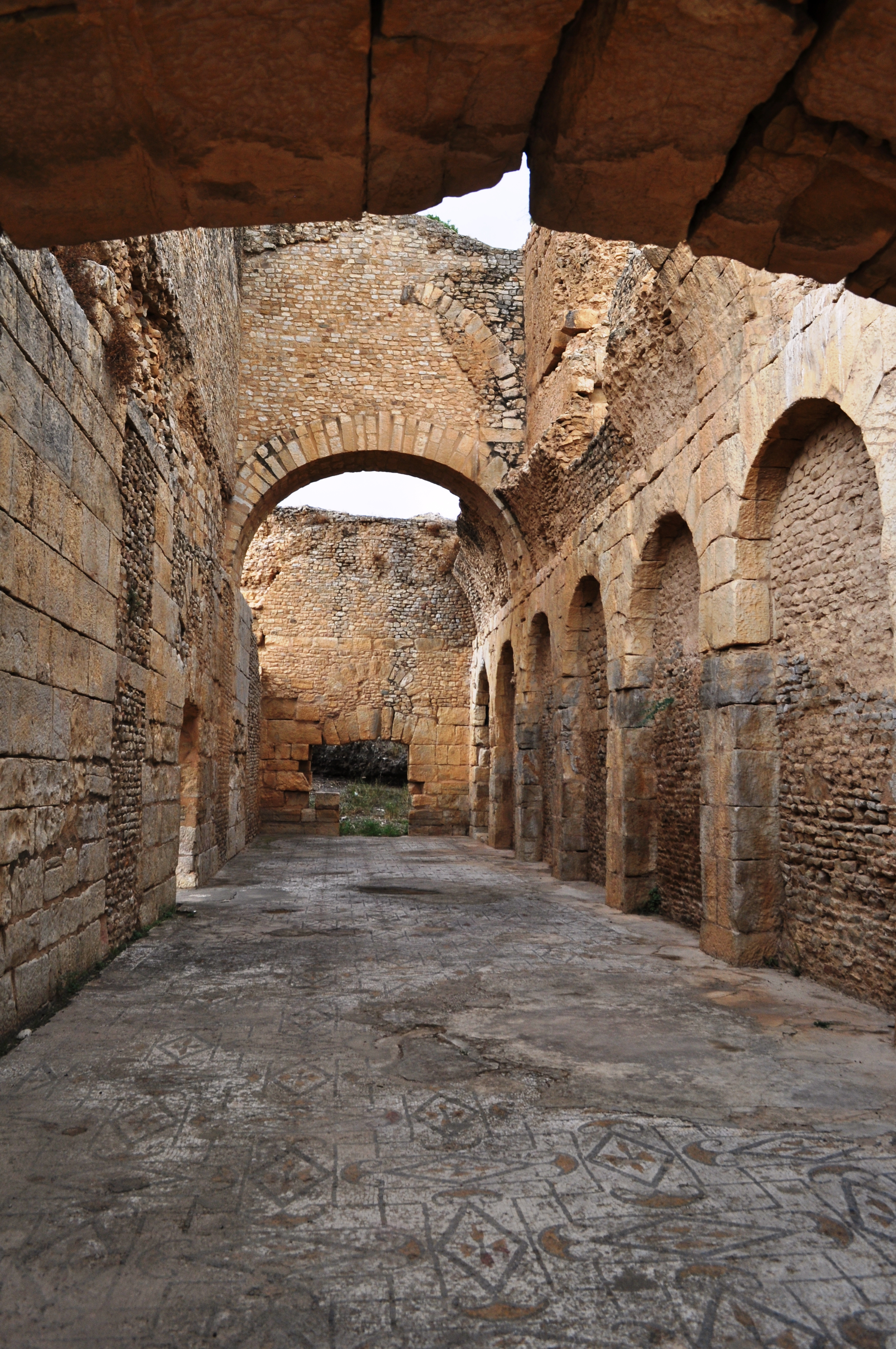 Thermes